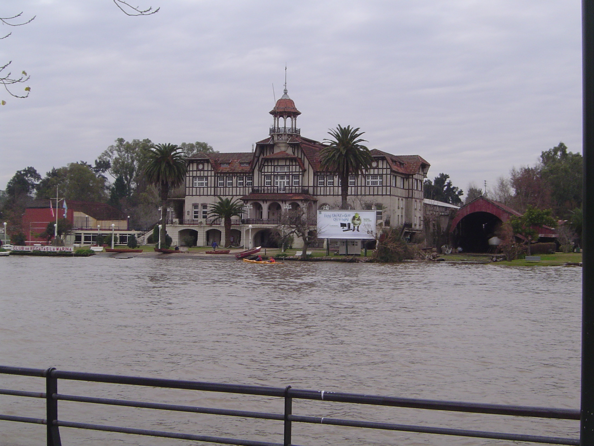 Club de Regatas LA MARINA en la ciudad de Tigre.